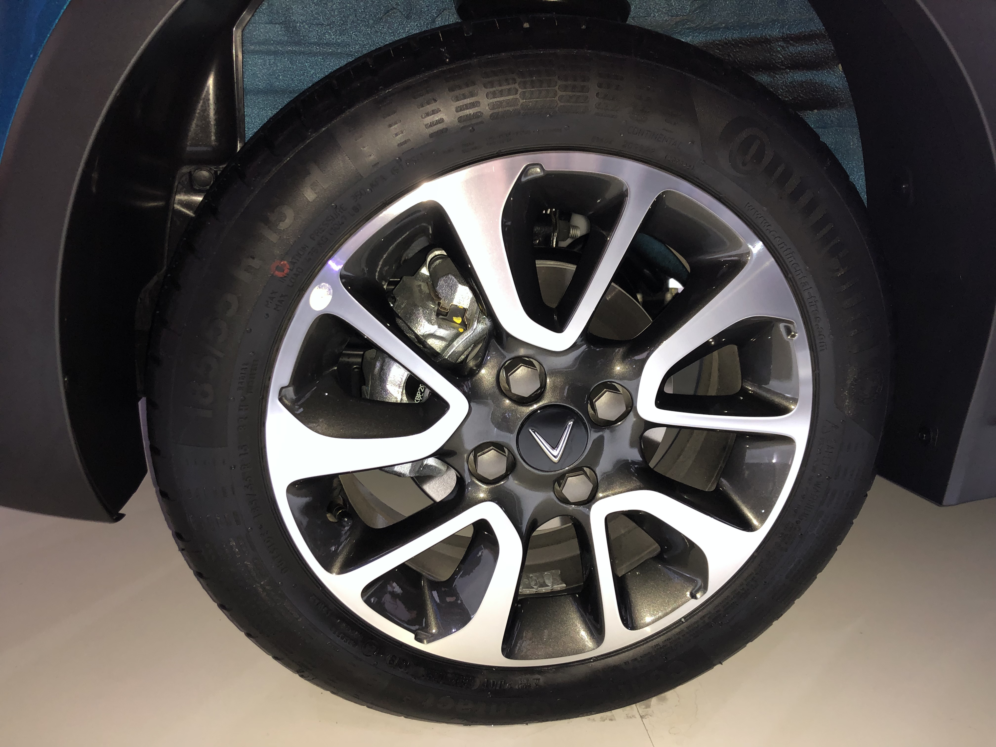 Lốp xe VinFast Fadil do hãng Continental AG sản xuất. Ảnh chụp tại buổi ra mắt ngày 20/11/2018 ở công viên Thống Nhất, Hà Nội